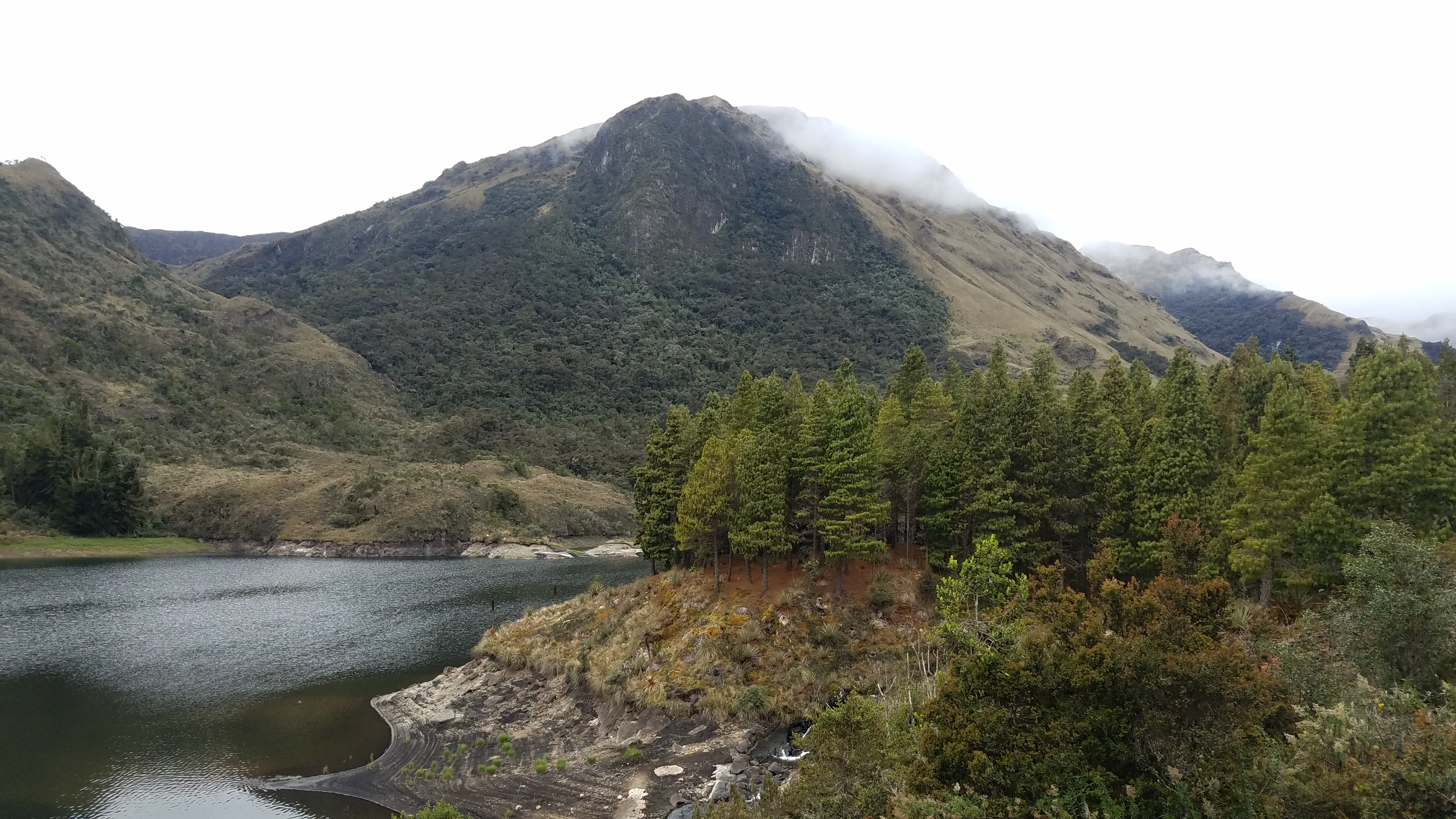 Vista panorámica de una laguna del parque con una montaña de fondo y un bosque a un costado